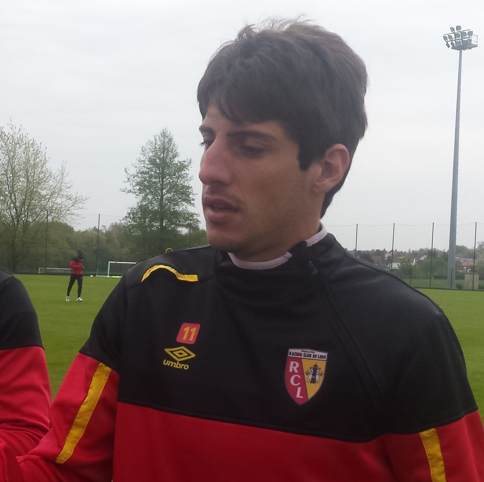 Pablo Chavarría lors d'un entraînement public du Racing Club de Lens, le 1er mai 2015, sur le terrain San Siro du Centre technique et sportif de La Gaillette.